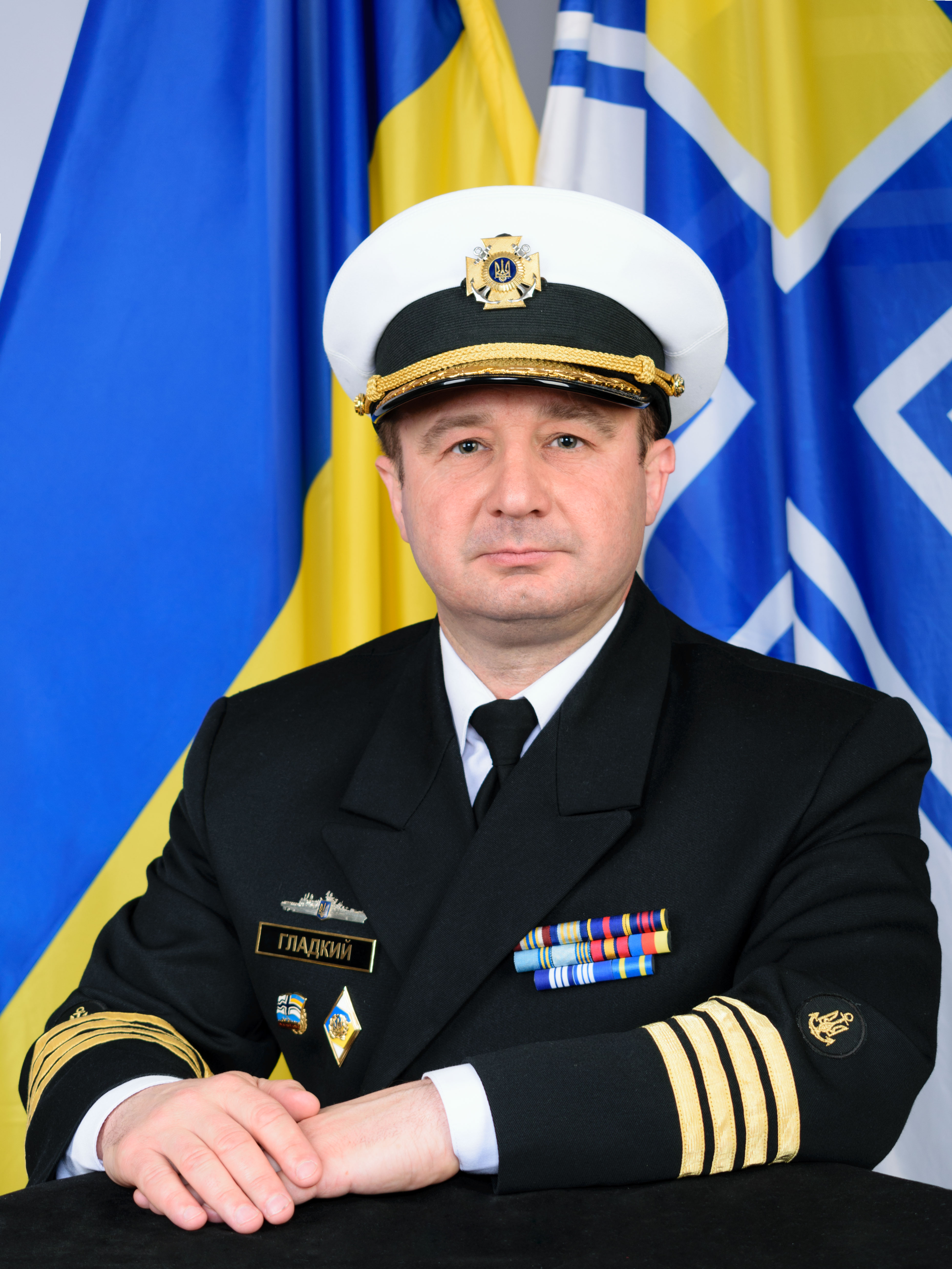 Капітан І рангу Гладкий Роман Миколайович